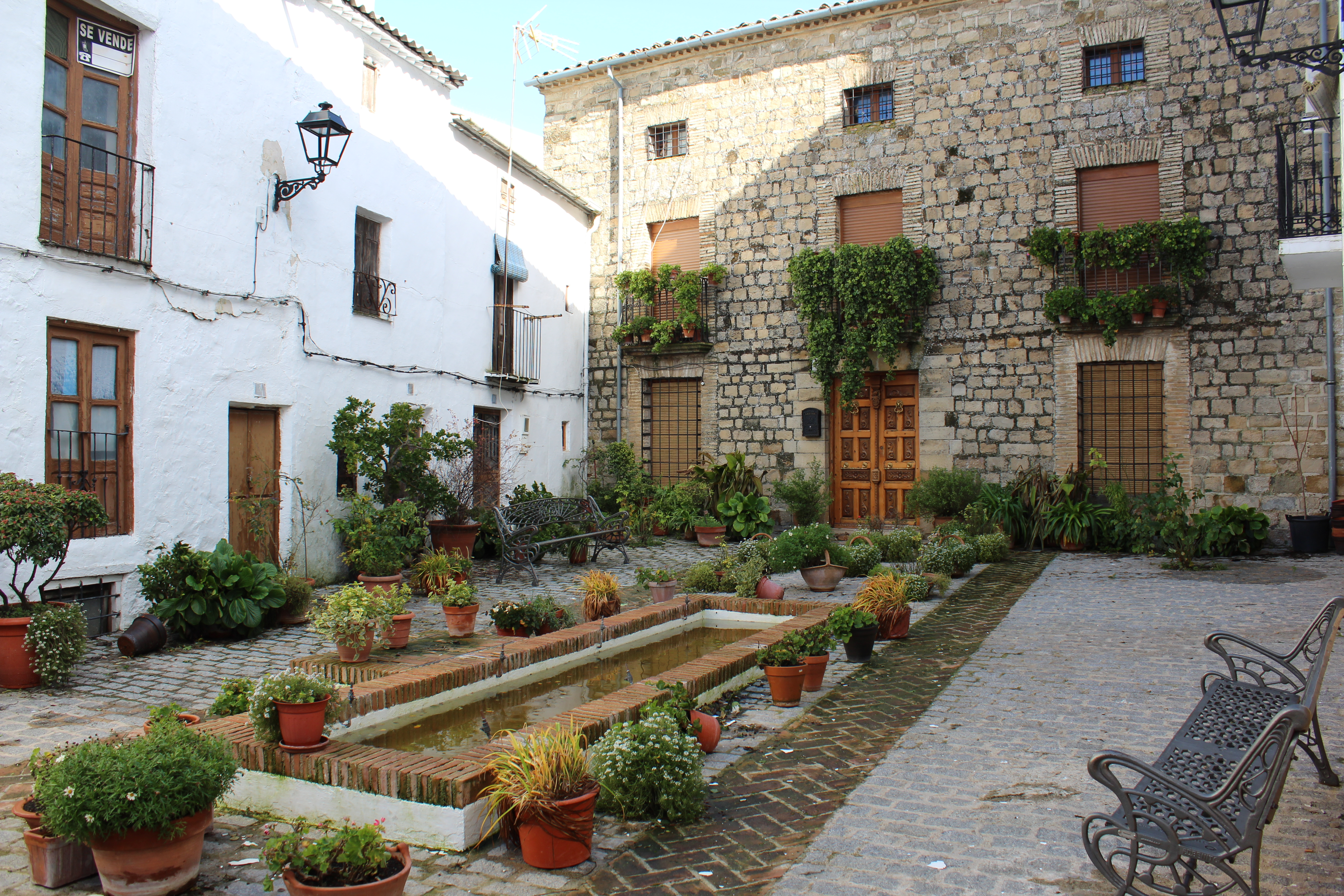 Vista de la bella Plaza del Convento, con su cuidada vegetación.